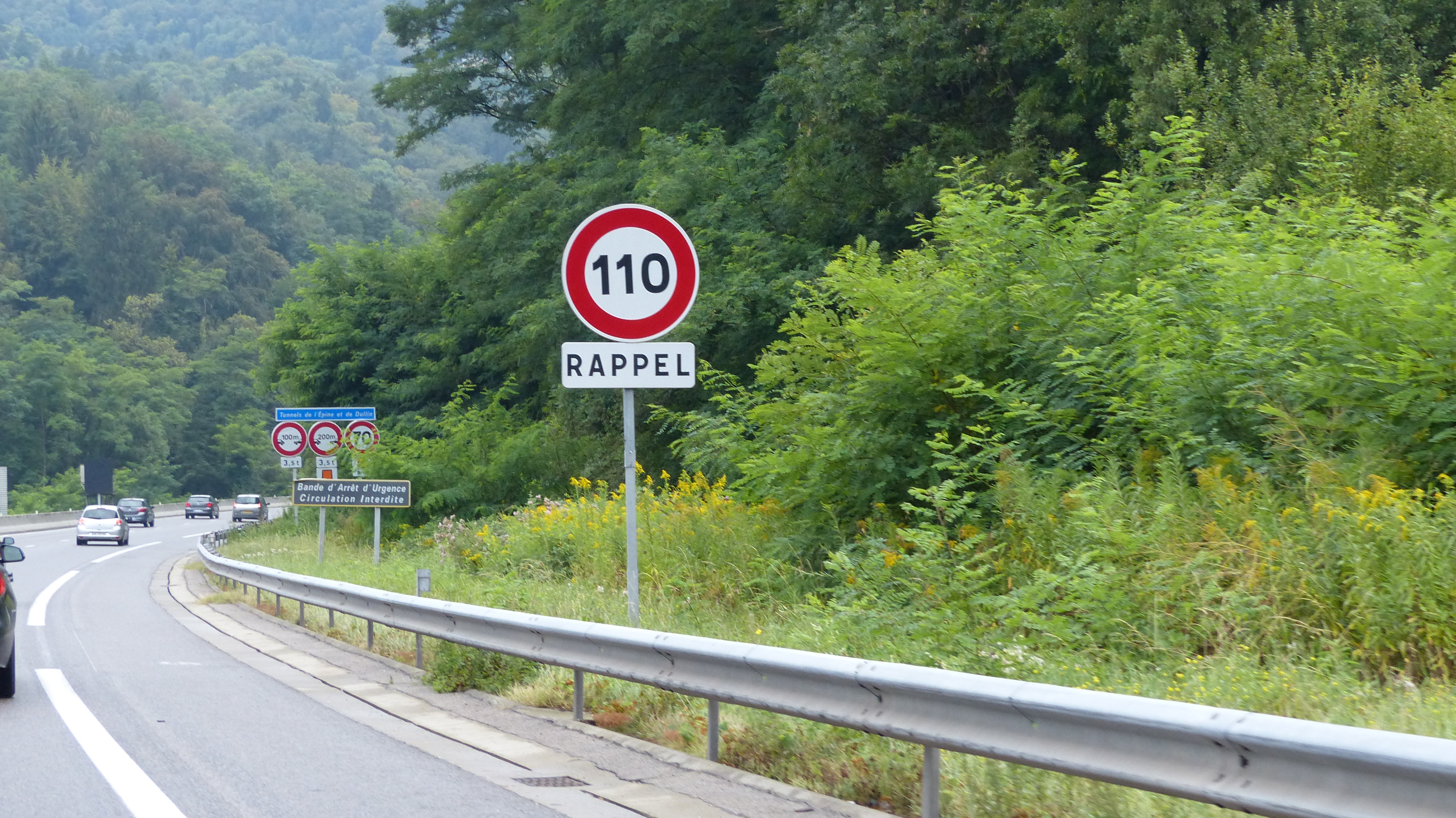 Panneau B14 110 km/h et panonceau rappel, autoroute A43, Savoie, France.